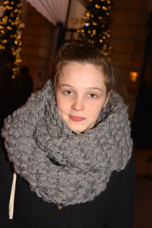 Solène Rigot au dîner des révélations des César du cinéma